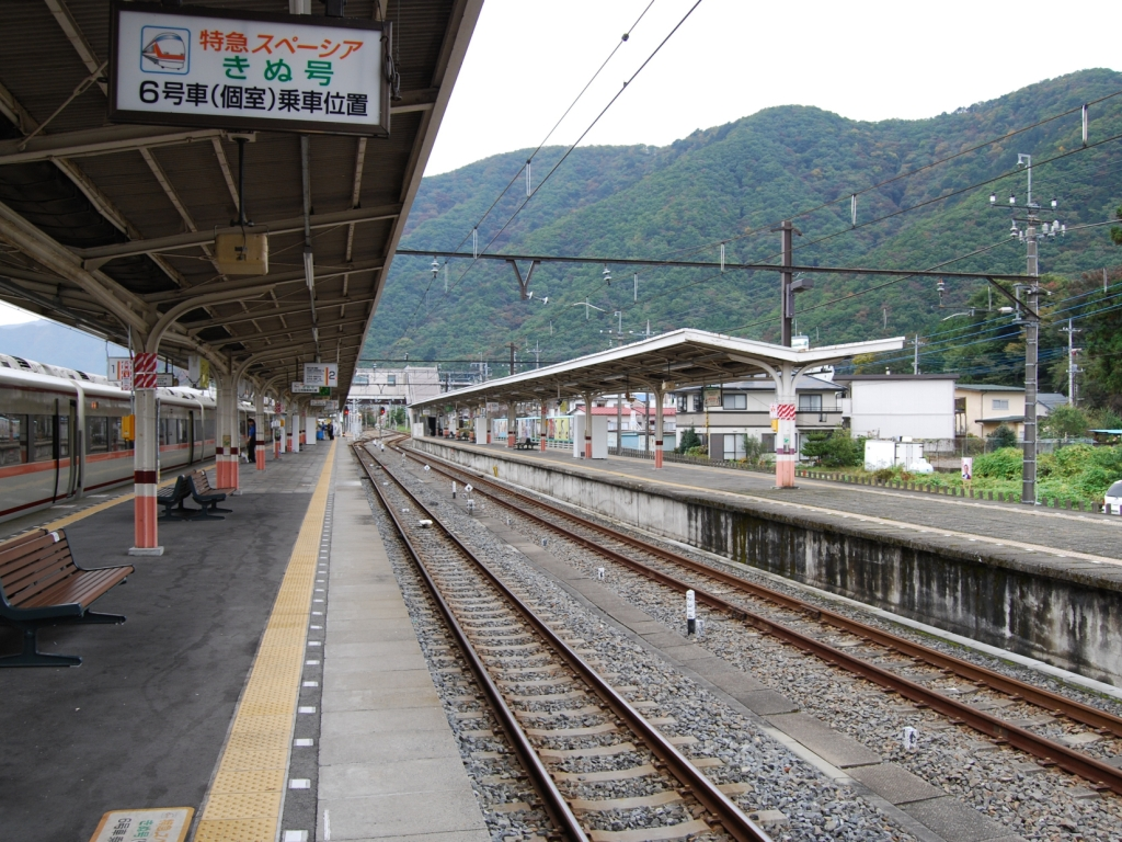 東武鉄道鬼怒川線鬼怒川温泉駅ホーム全景（2008/10/26撮影）